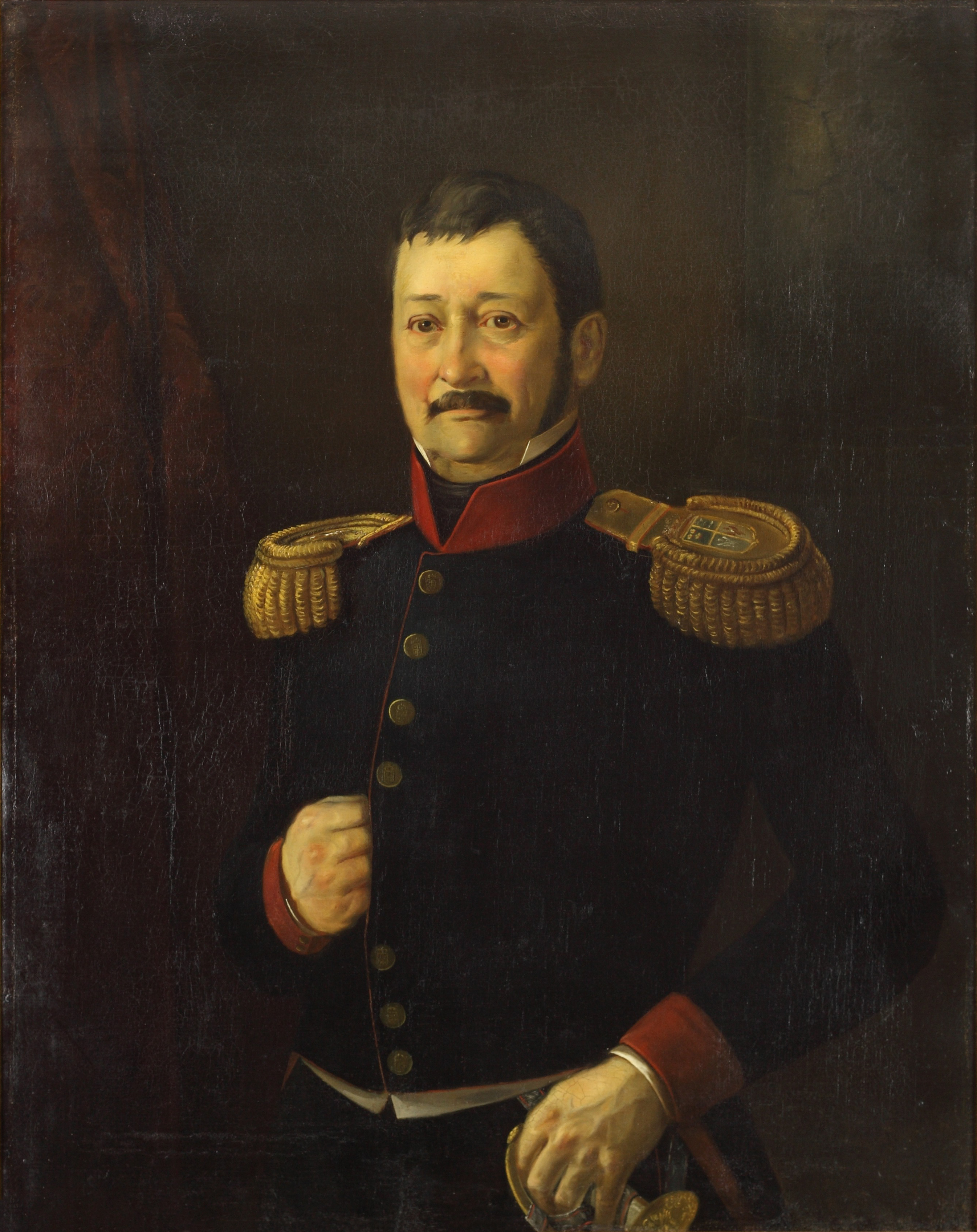 Kazimierz Janota Bzowski (1792-1862) – oficer wojsk Księstwa Warszawskiego, ziemianin galicyjski.